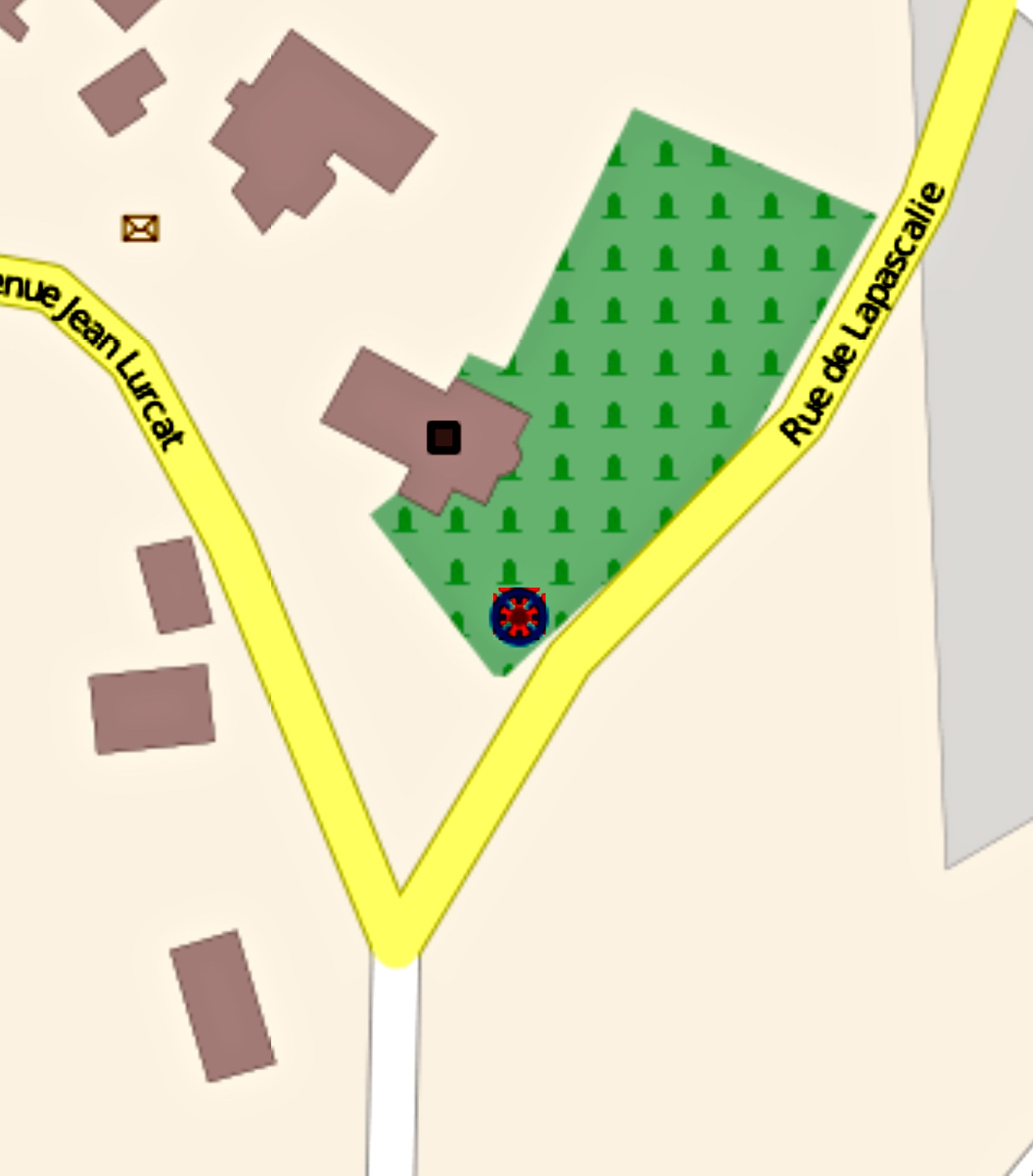 Plan of the cemetery of Saint-Laurent-les-Tours (France)